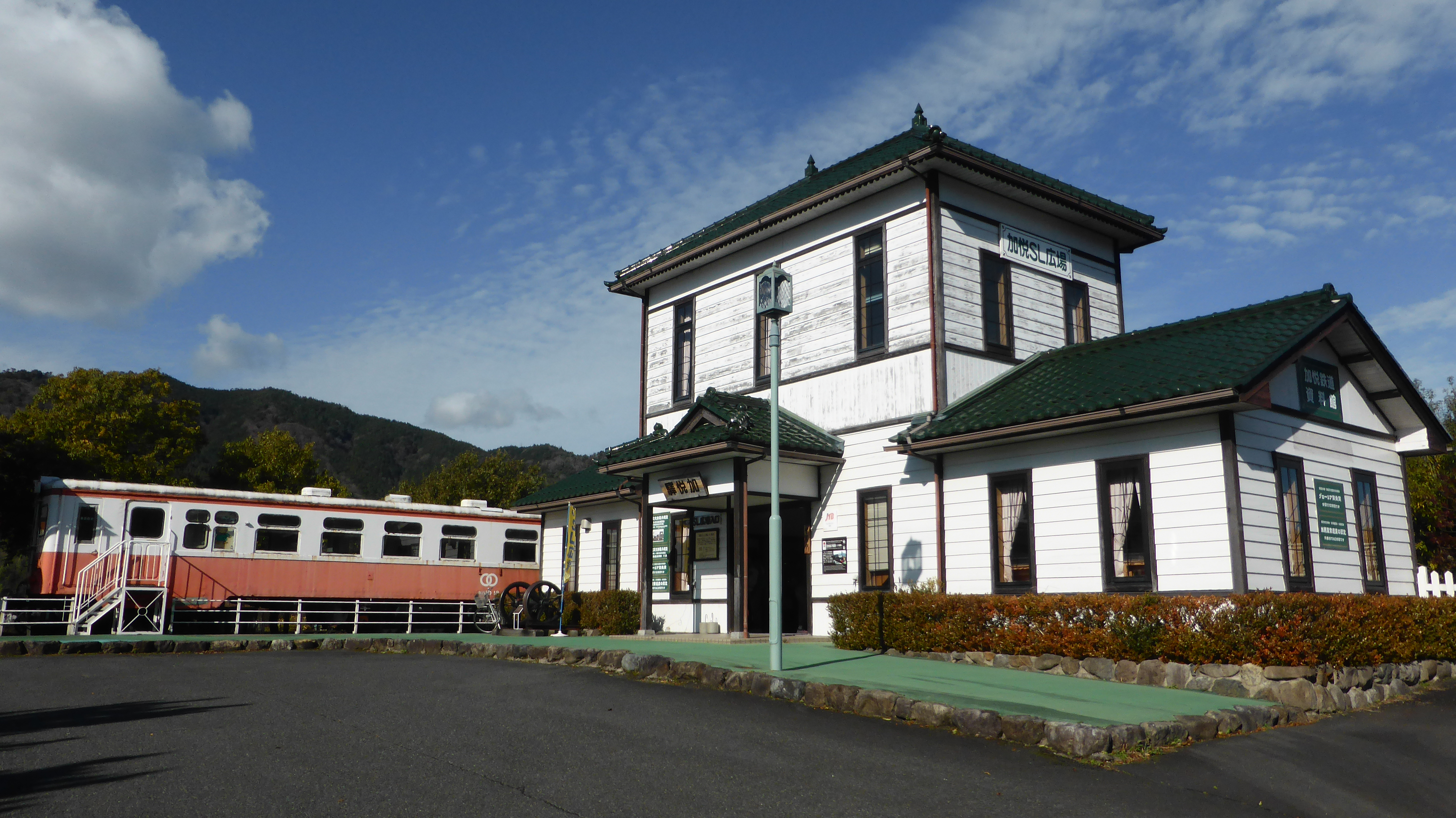 加悦SL広場構内へのメインゲート 駅舎 展示室 2019.12.29撮影